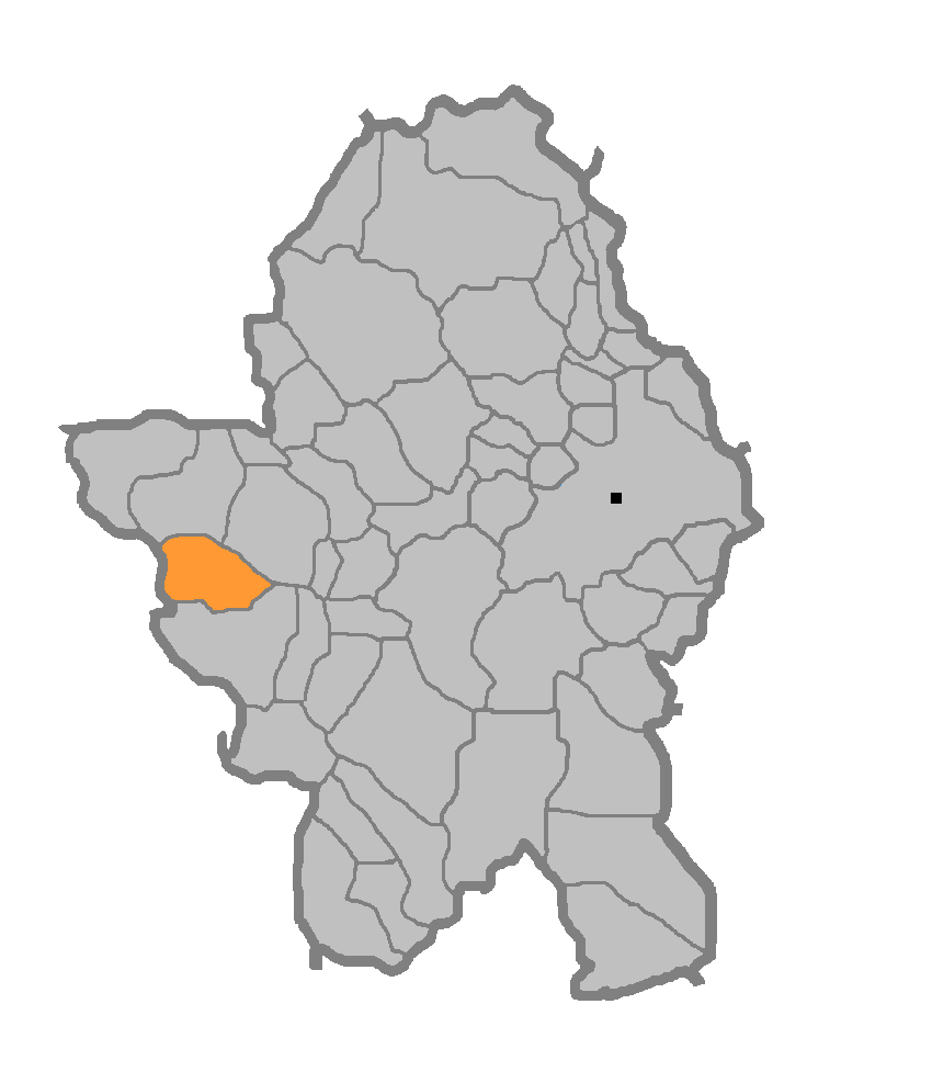 Мјесна заједница Кмећани